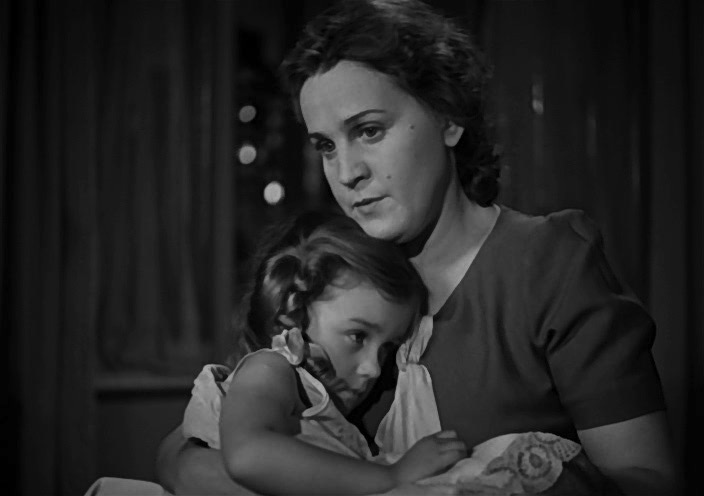 «Подкидыш» — художественный фильм производства киностудии «Мосфильм» 1939 года. Один из самых первых семейных фильмов в Советском Союзе, сценаристами которого стали актриса Рина Зелёная и писательница Агния Барто. Мама героини фильма.